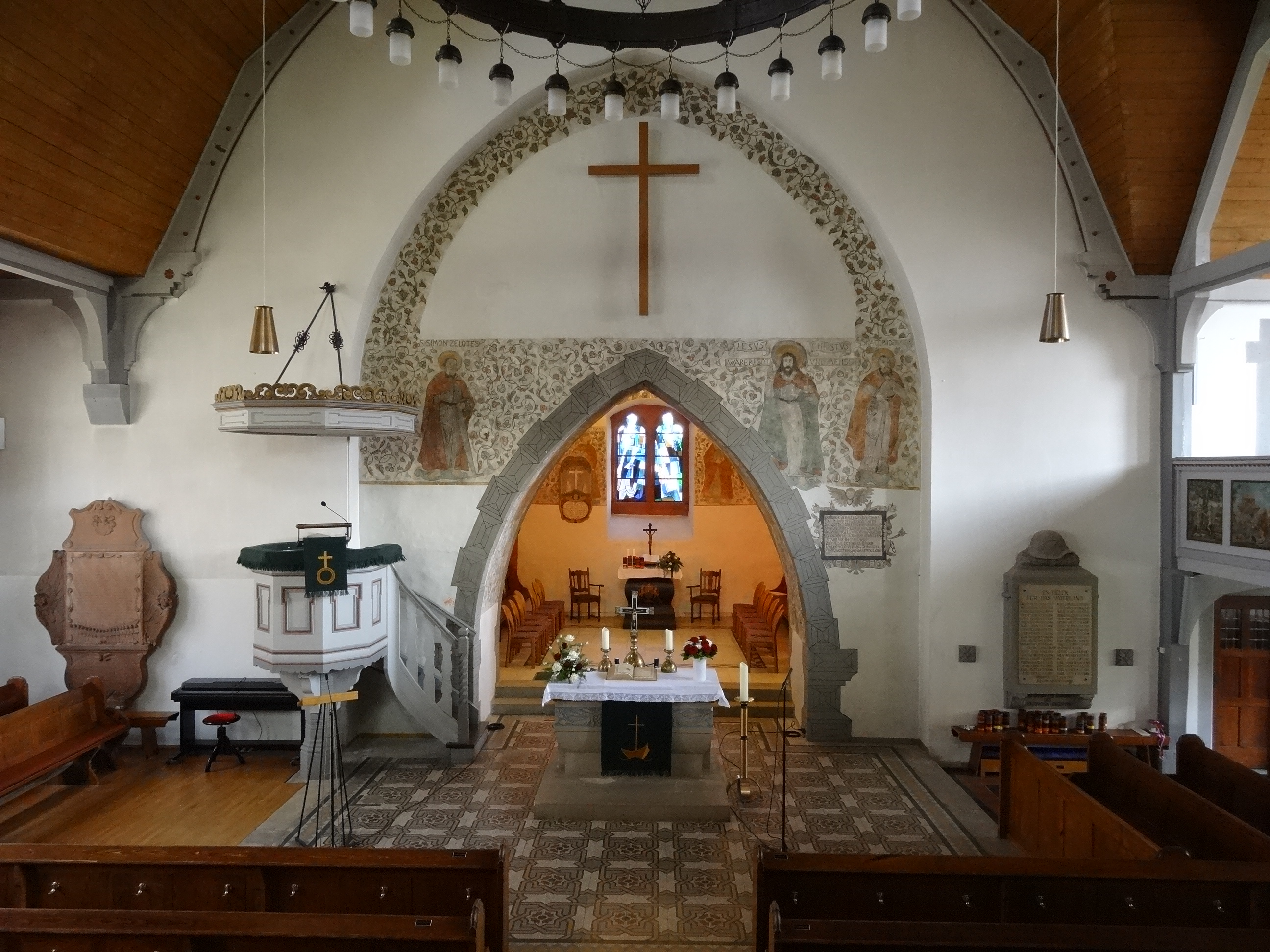 Evangelische Kirche Leihgestern